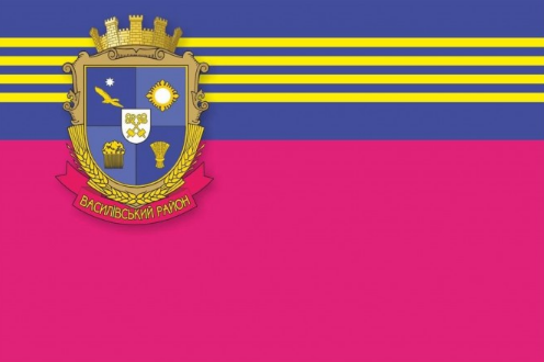 Прапор Василівського району